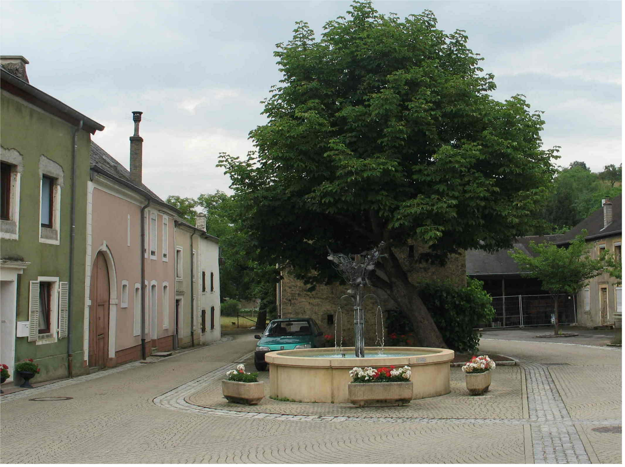 Sujet: Greiweldeng * Auteur: User:Reniarf * Source: eege Foto * Lizenz: GFDL